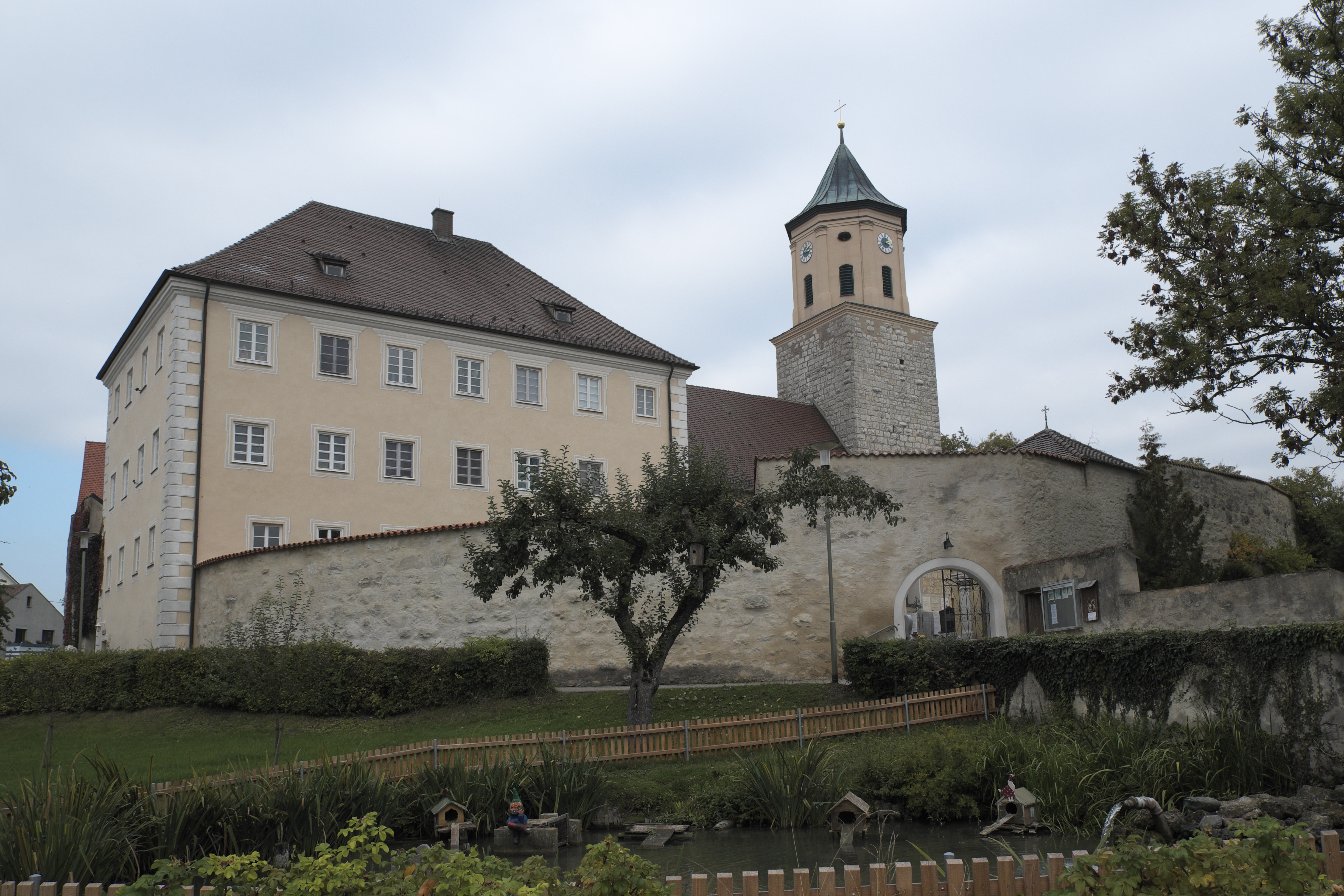 Burg Gosheim in Gosheim (Huisheim) im Landkreis Donau-Ries (Schwaben/Bayern), aus dem 16. Jahrhunderts